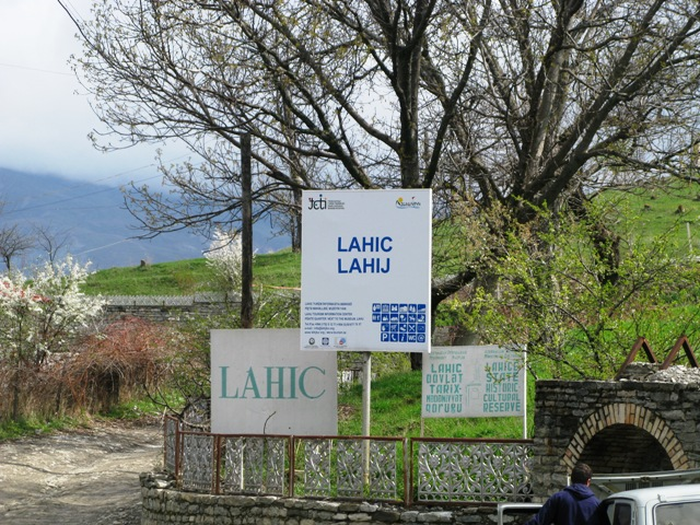 Горная река в Исмаиллиском районе Азербайджана